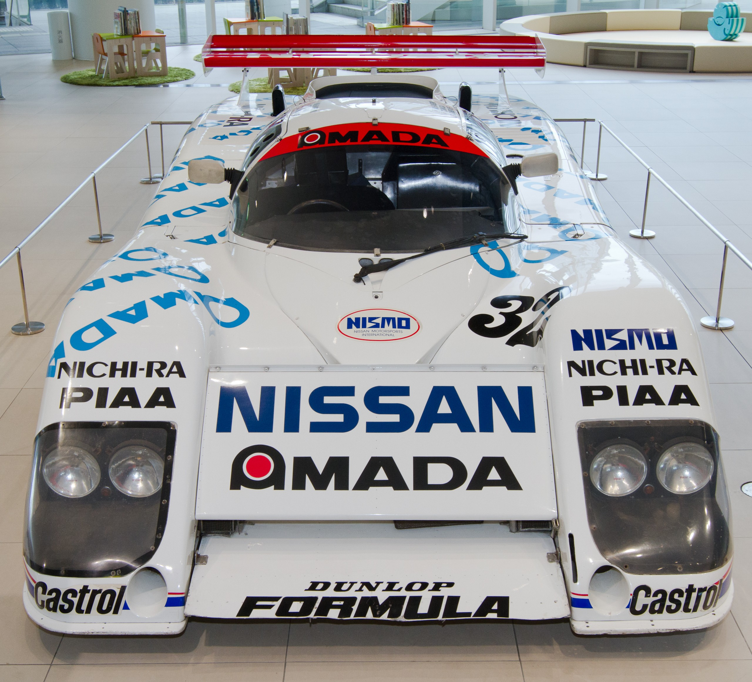 1986 Nissan 85V